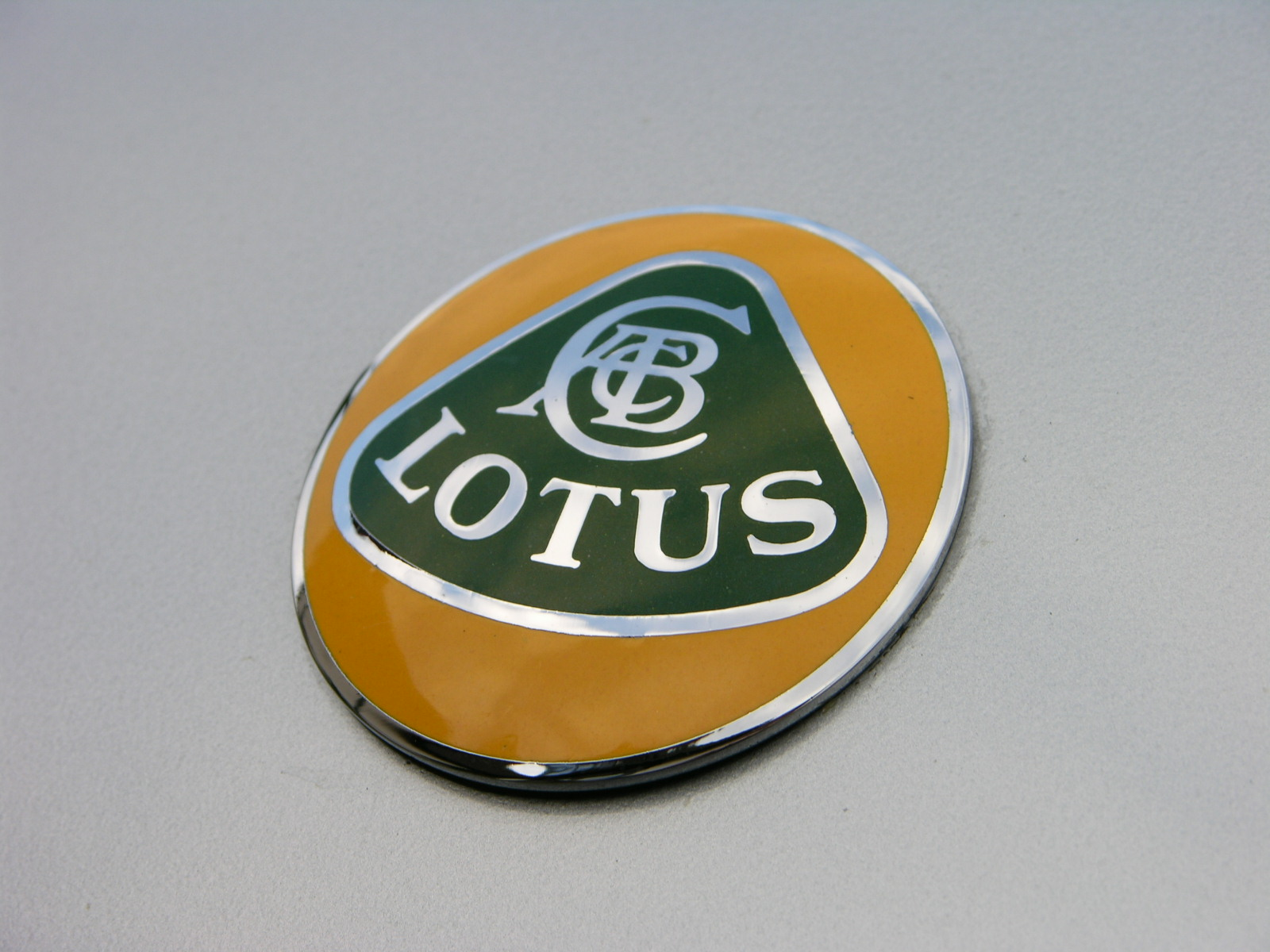 Lotus Elise 135